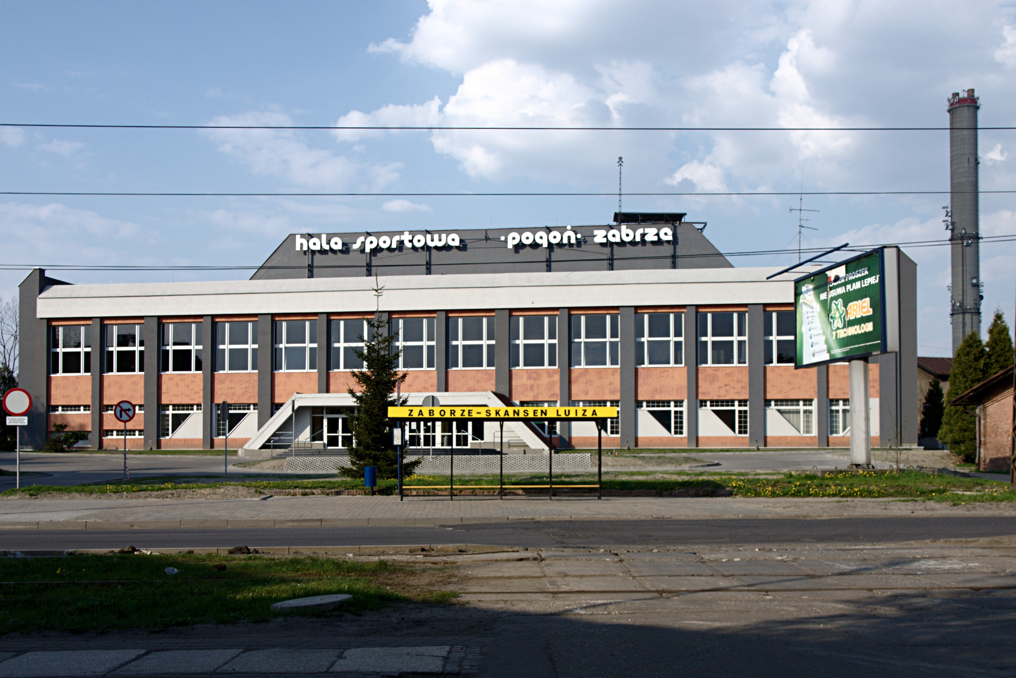 Ulica Wolności w Zabrzu. Hala klubu sportowego "Pogoń Zabrze".